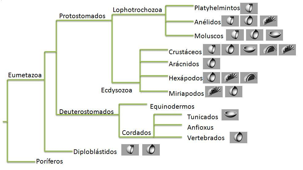 Se muestra una filogenia simplificada de los Metazoos. Para algunos grupos se asocia una representación esquemática para algunos de los tipos de ojos que pueden presentar: Copa, Cámara con orificio de entrada de luz, Cámara con lente, Compuesto por aposición y Compuesto por superposición.